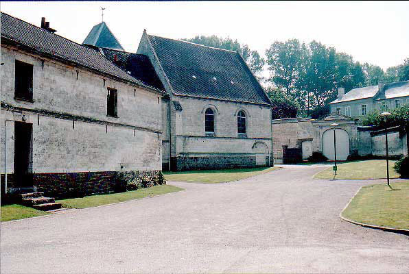 Le centre de Villers Brulin